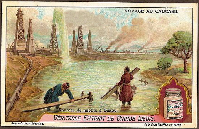 Stara pocztówka z 1920 r. Baku